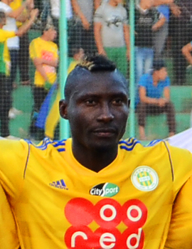 Albert Ebossé sous le maillot de la JS Kabylie le 23 août 2014, lors du match contre l'USM Alger au stade du 1er-Novembre-1954. Un match à l'issue duquel l'attaquant camerounais est décédé. This file has been extracted from another file: JS Kabylie, 2014-08-23.jpg